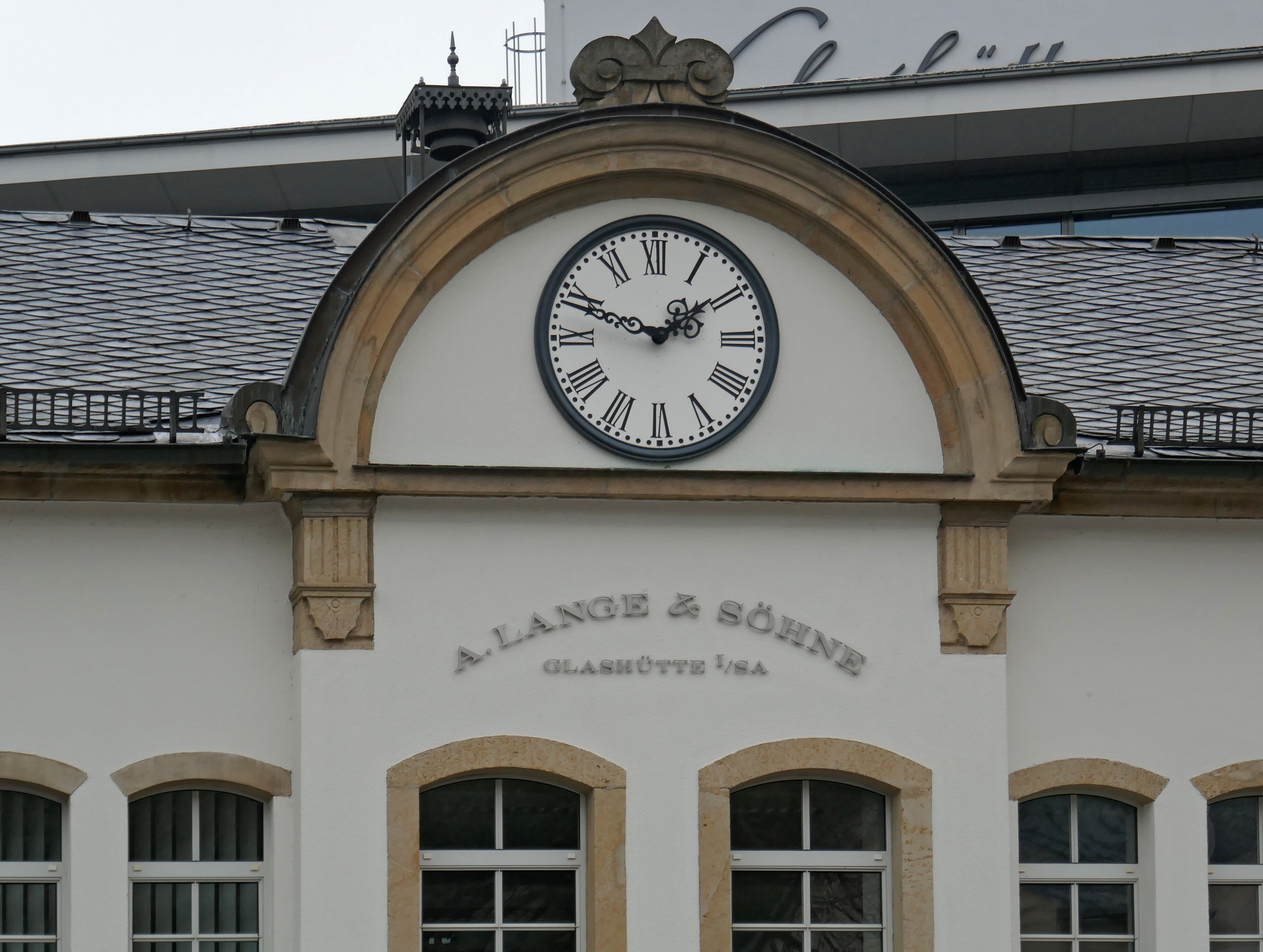 A. Lange & Söhne-Stammhaus in Glashütte im Osterzgebirge, Sachsen.